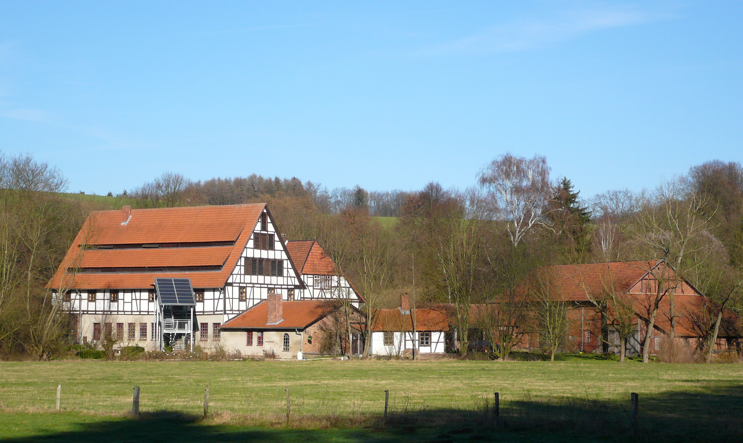 Historische Streichgarnspinnerei im Gartetal bei Gleichen-Klein Lengden, Landkreis Göttingen, Niedersachsen